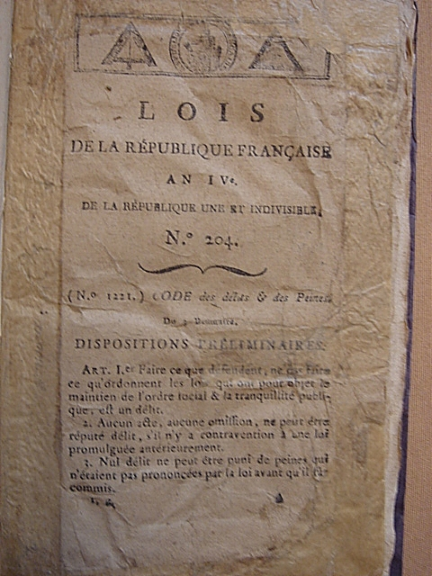 Page de frontispice du Code des délits et des peines, code pénal français